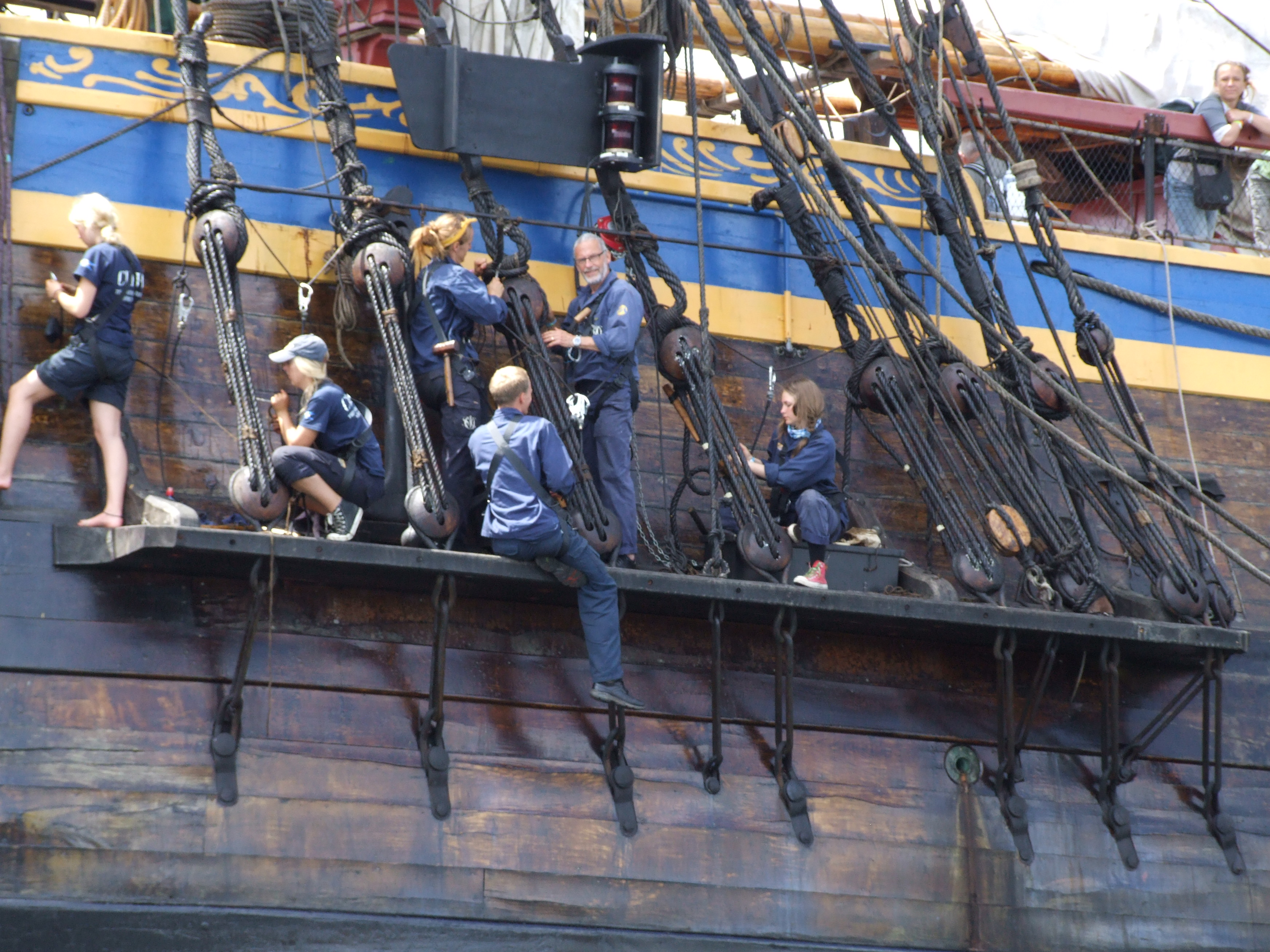 Les Tonnerres de Brest 2012 : Ecole de matelotage à bord du Götheborg